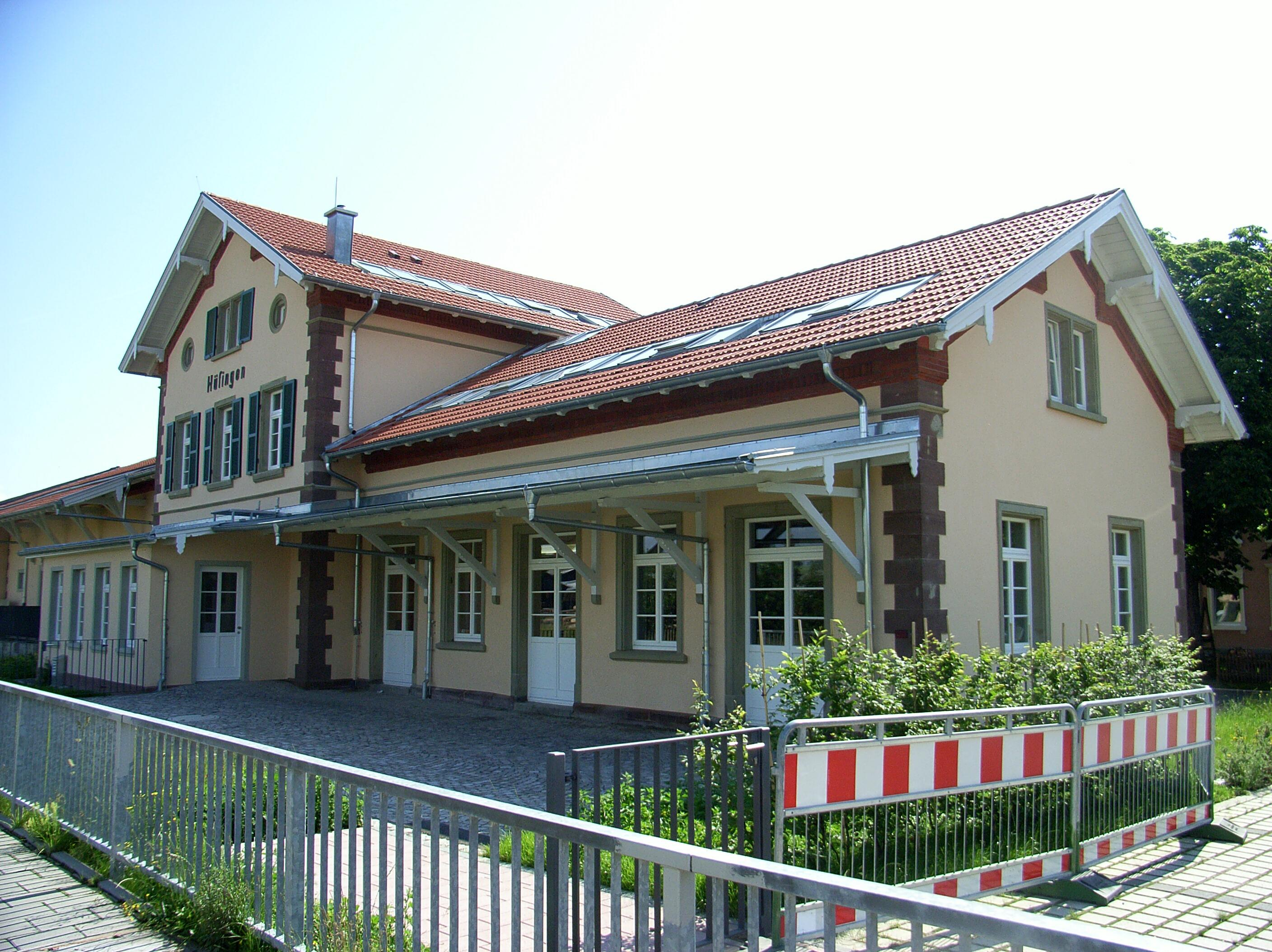 Dieses Bild zeigt den Bahnhof Hufingen in Hufingen.